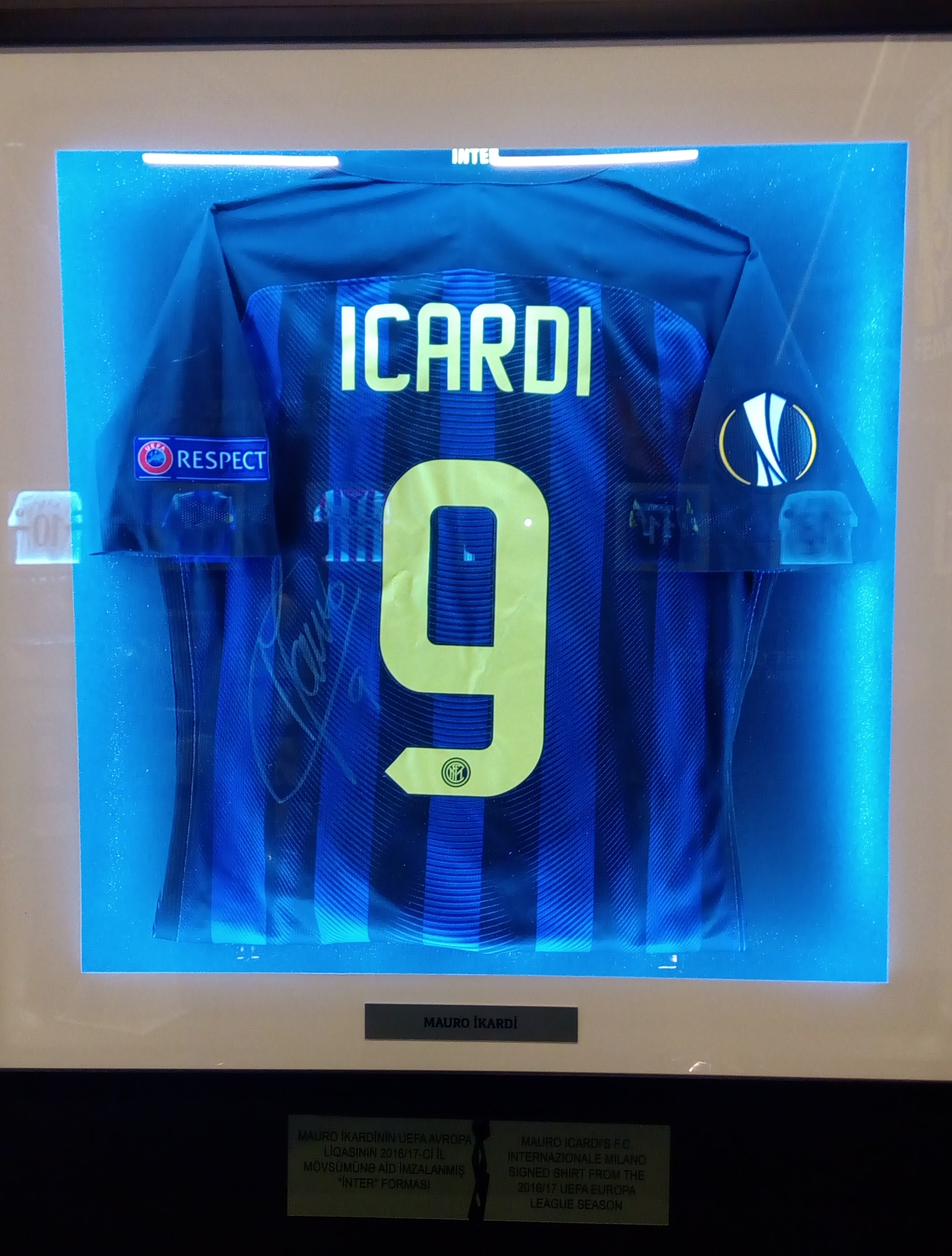 Avropa Liqası Muzeyi Bakıda